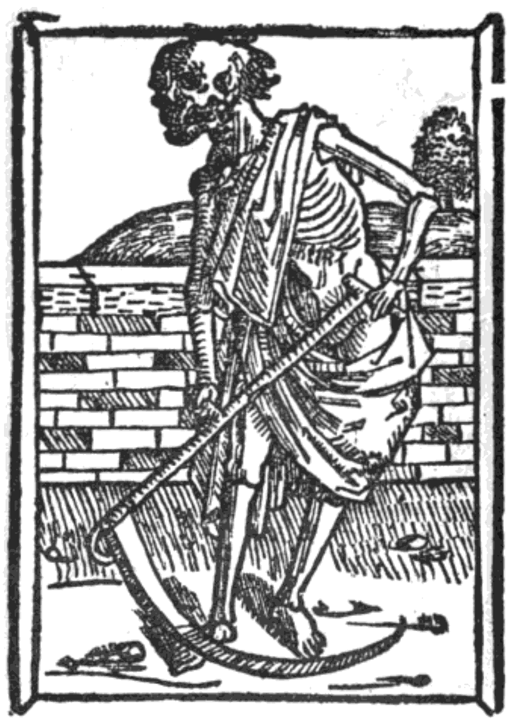 Illustration af Døden fra Dødedansen